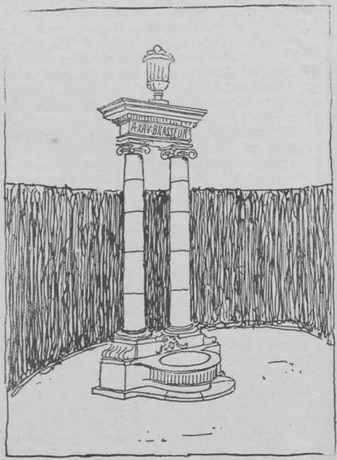 Projet vun engem 9 Meter héijen Denkmal mat Vullendränk zu Éiere vum Xavier Brasseur.